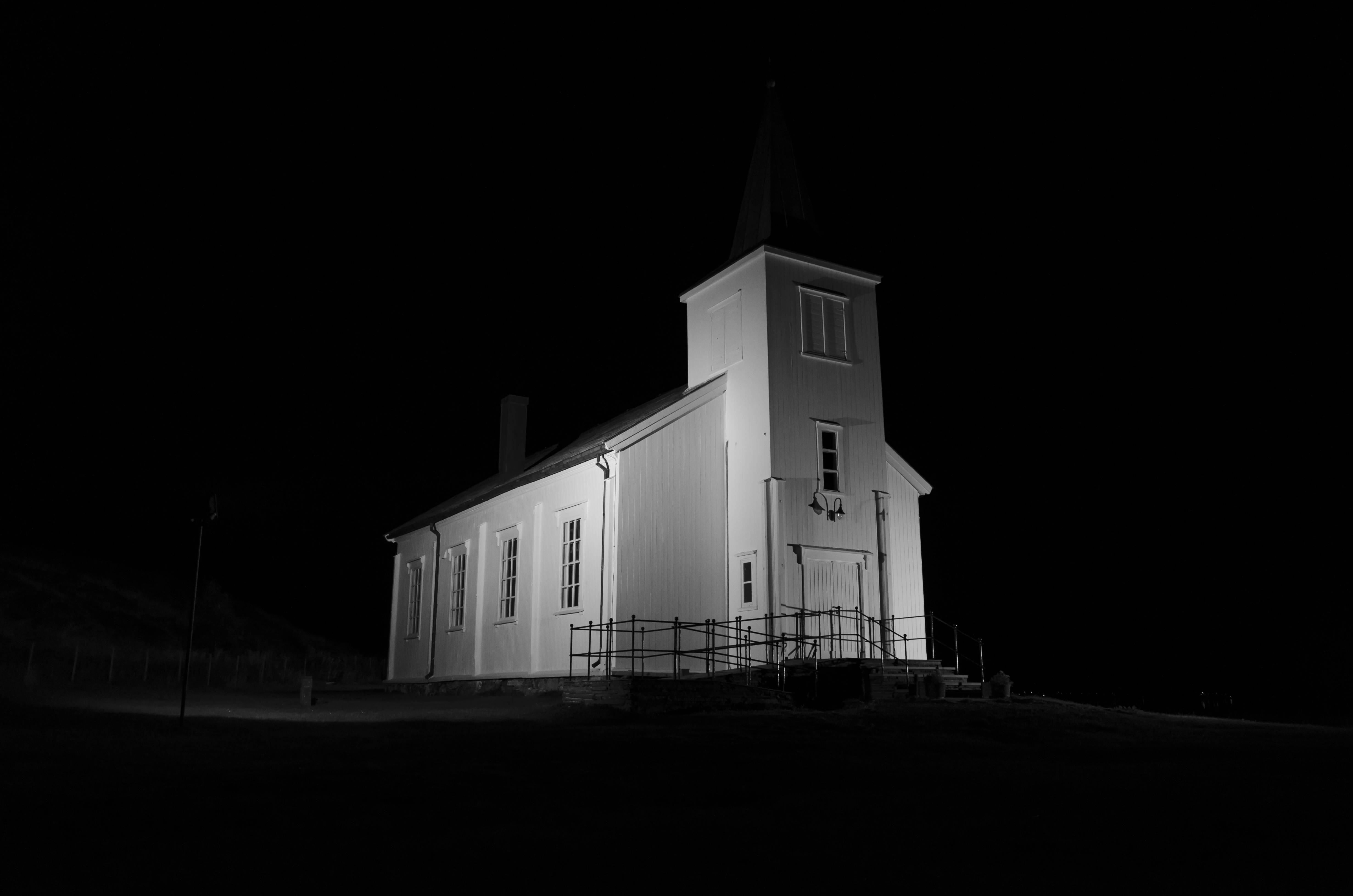 Langfjord kirke